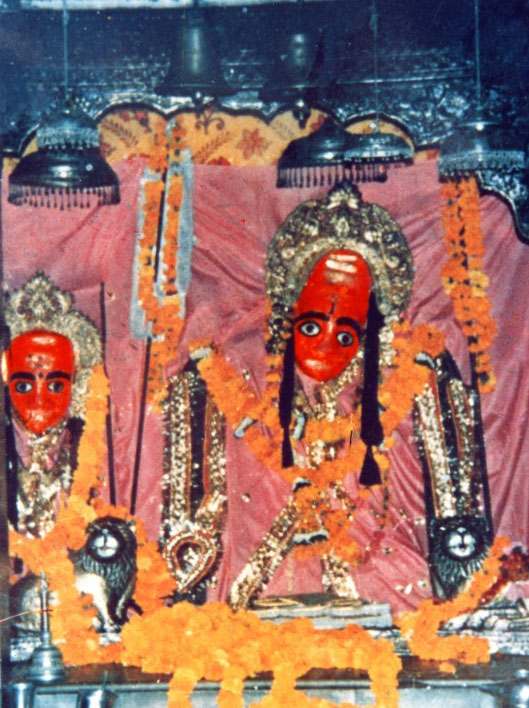 कैला देवी मंदिर